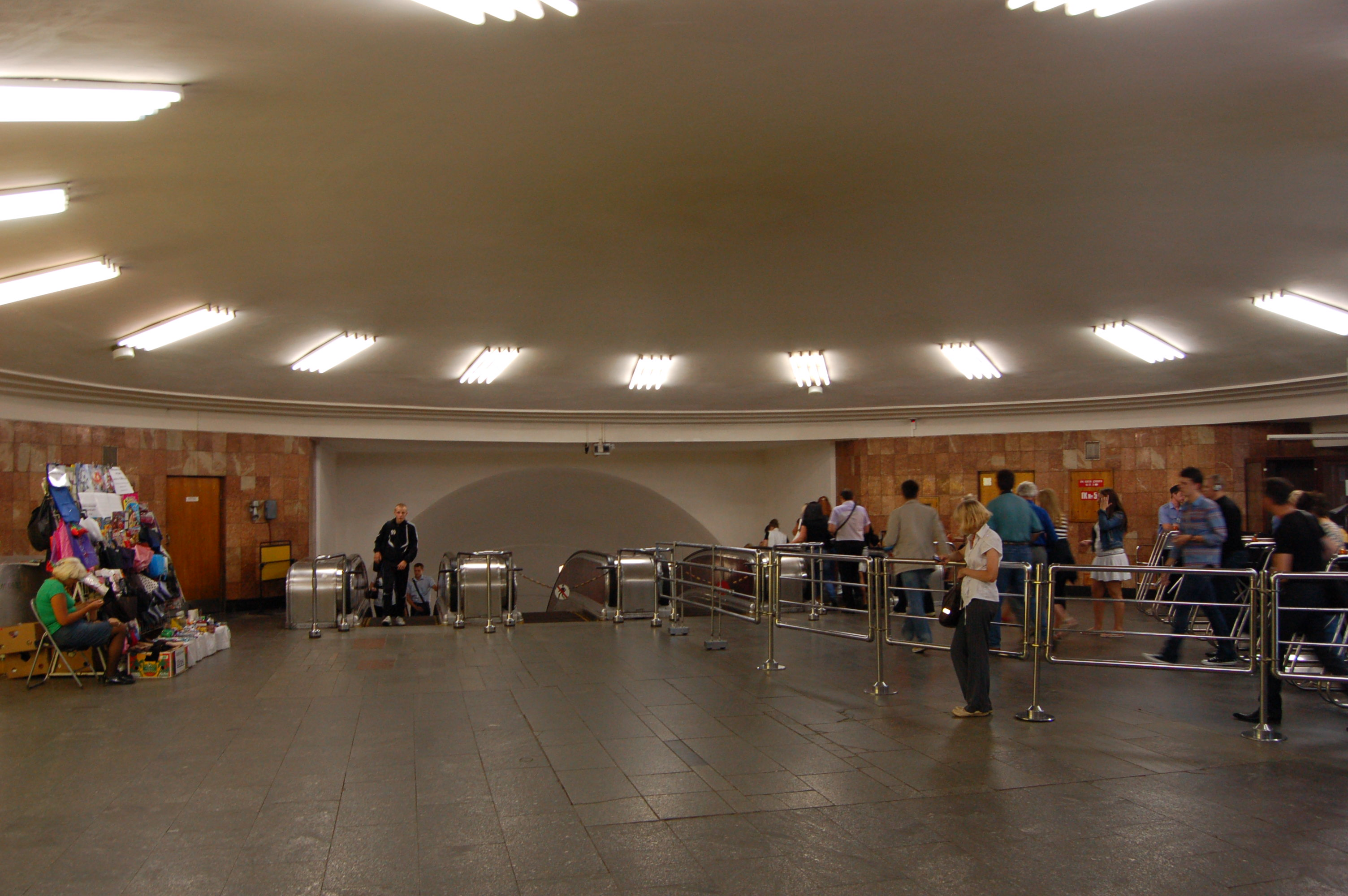 Cтанция метро «Площадь Независимости», подземный вестибюль